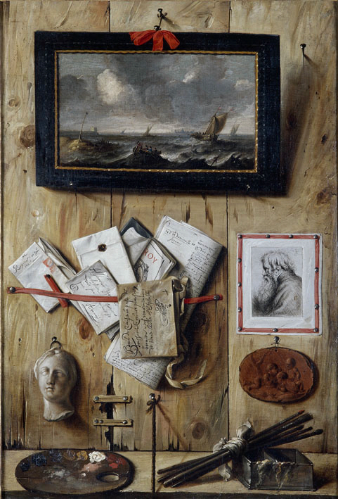 Jean-François de Le Motte (1625-1685). Trompe-l'oeil